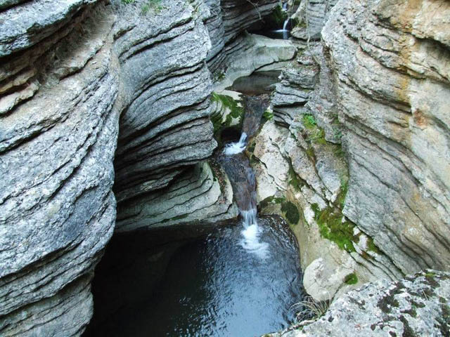 Росомачки лонци